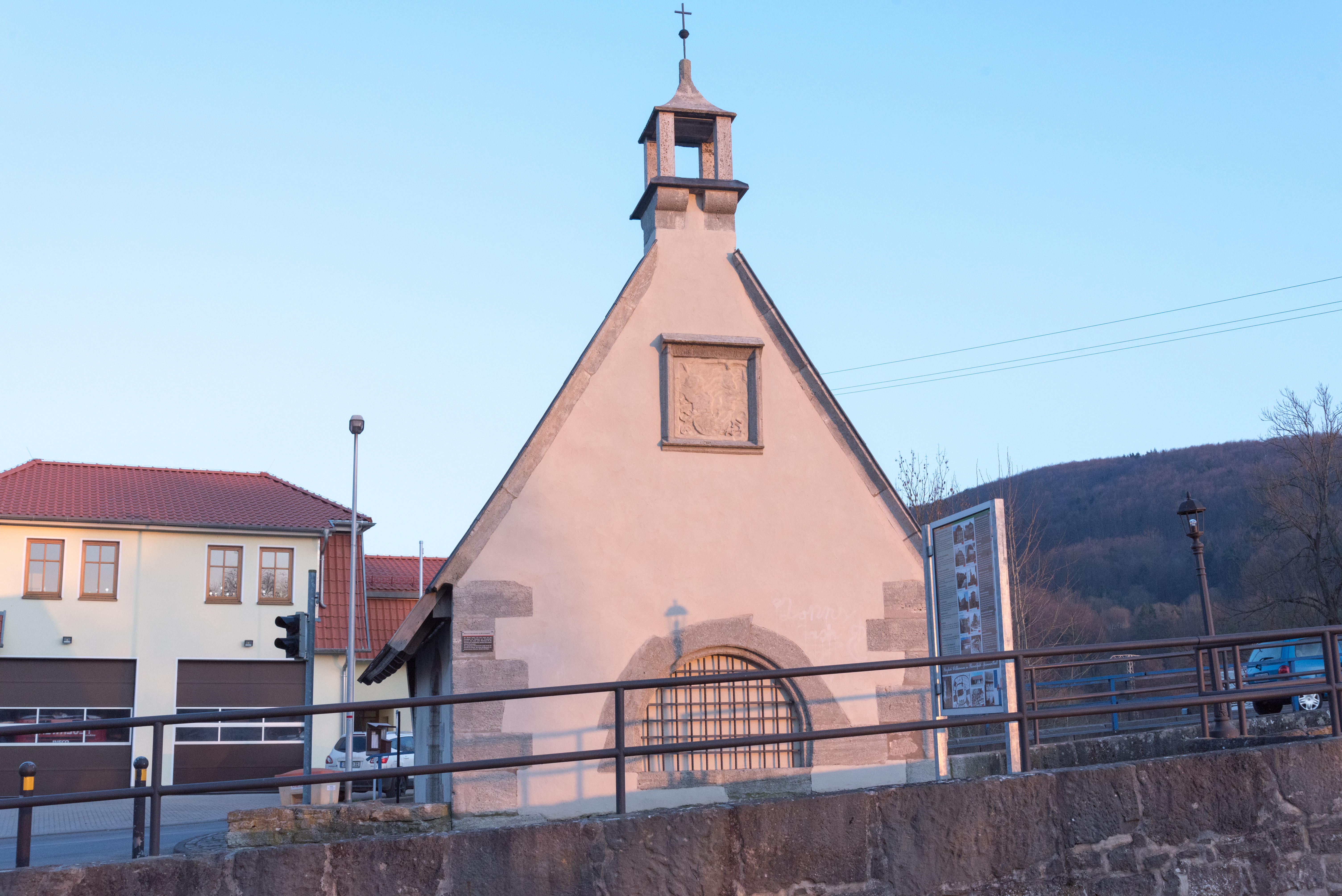 Obermaßfeld, Brückenkapelle